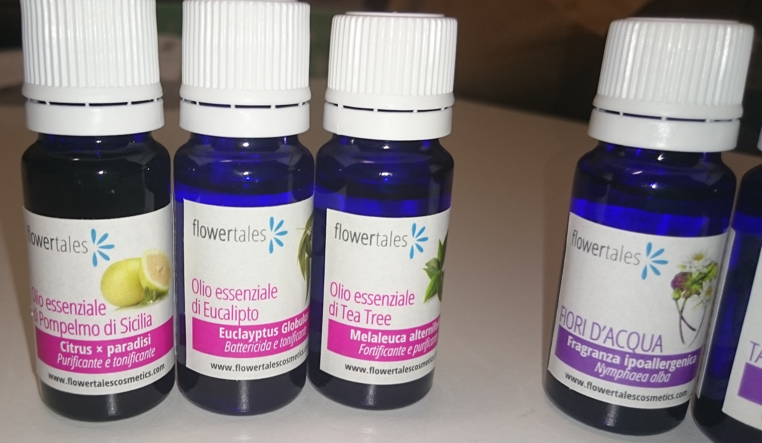 Oli essenziali naturali puri e fragranze ipoallergeniche